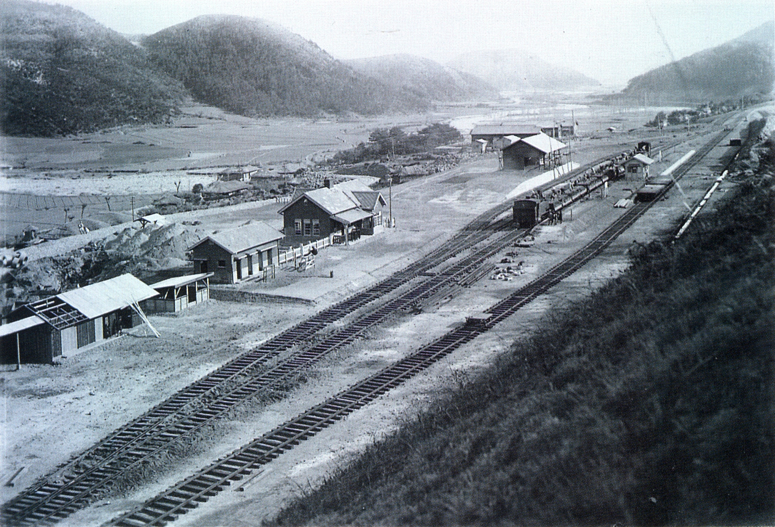 학구역